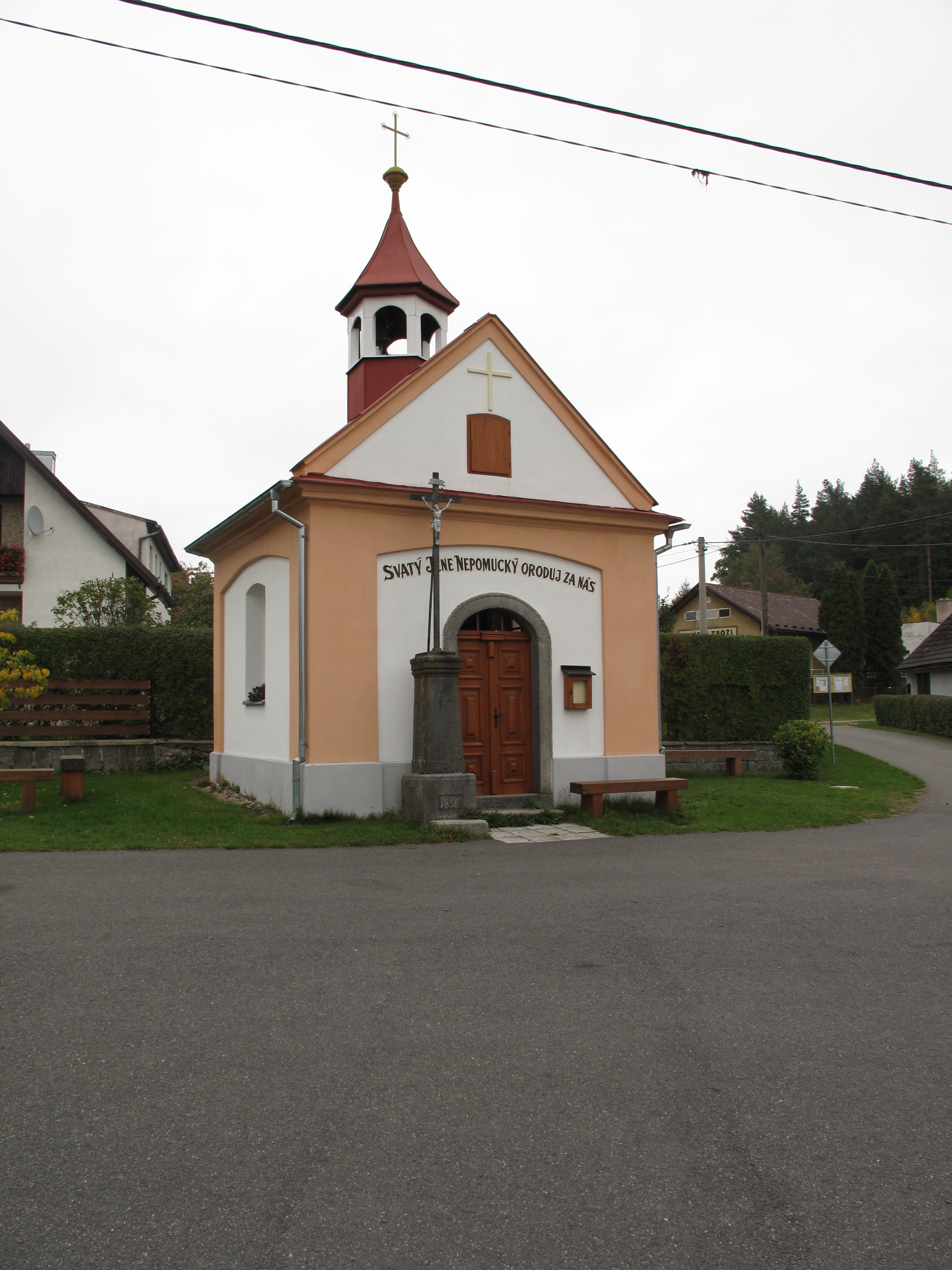 Plichtice. Okres Klatovy, Česká republika.